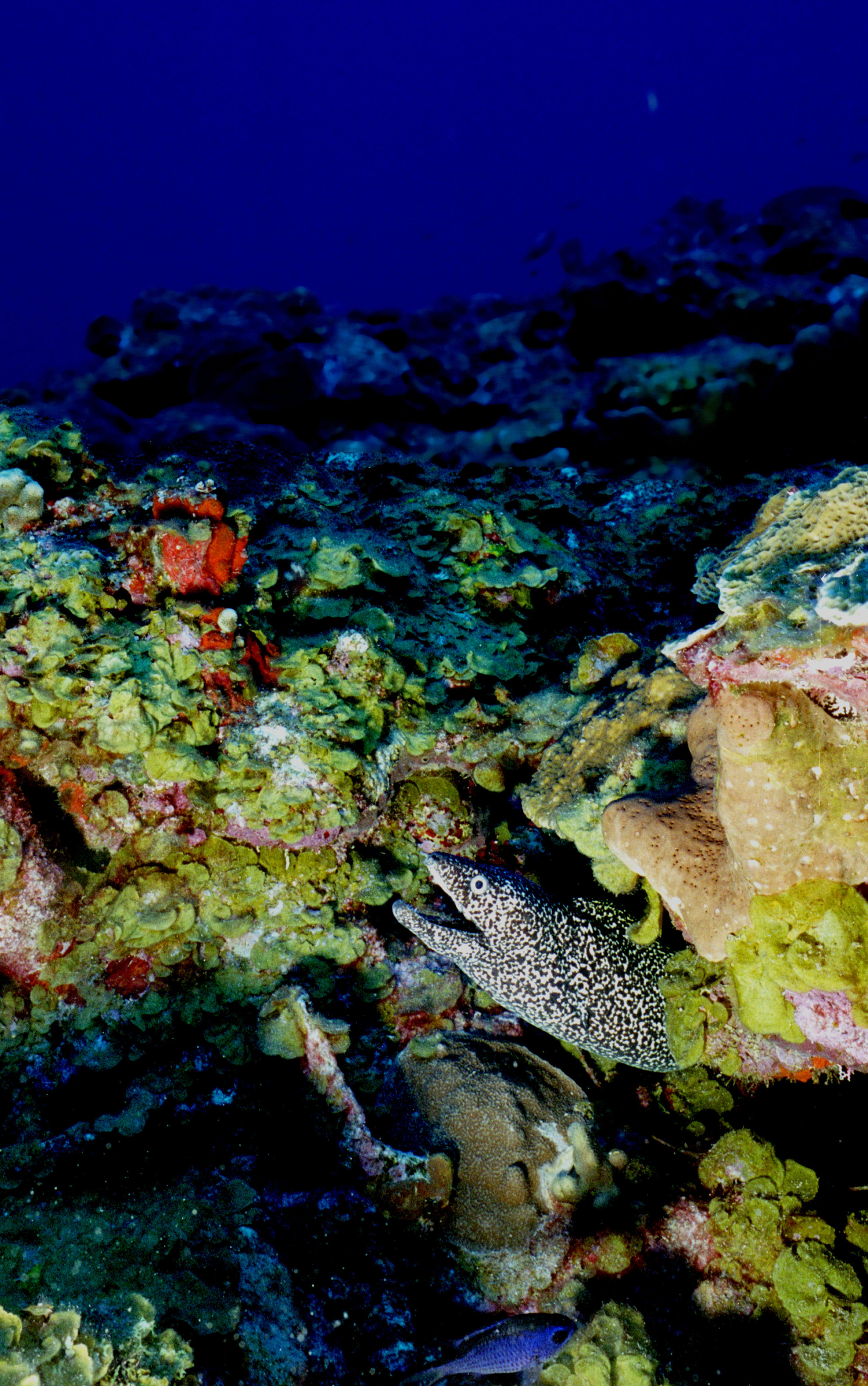 Photo prise à Saba